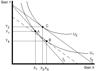 Substitution efect graph in spanish. La gráfica que muestra el efecto sustitución.